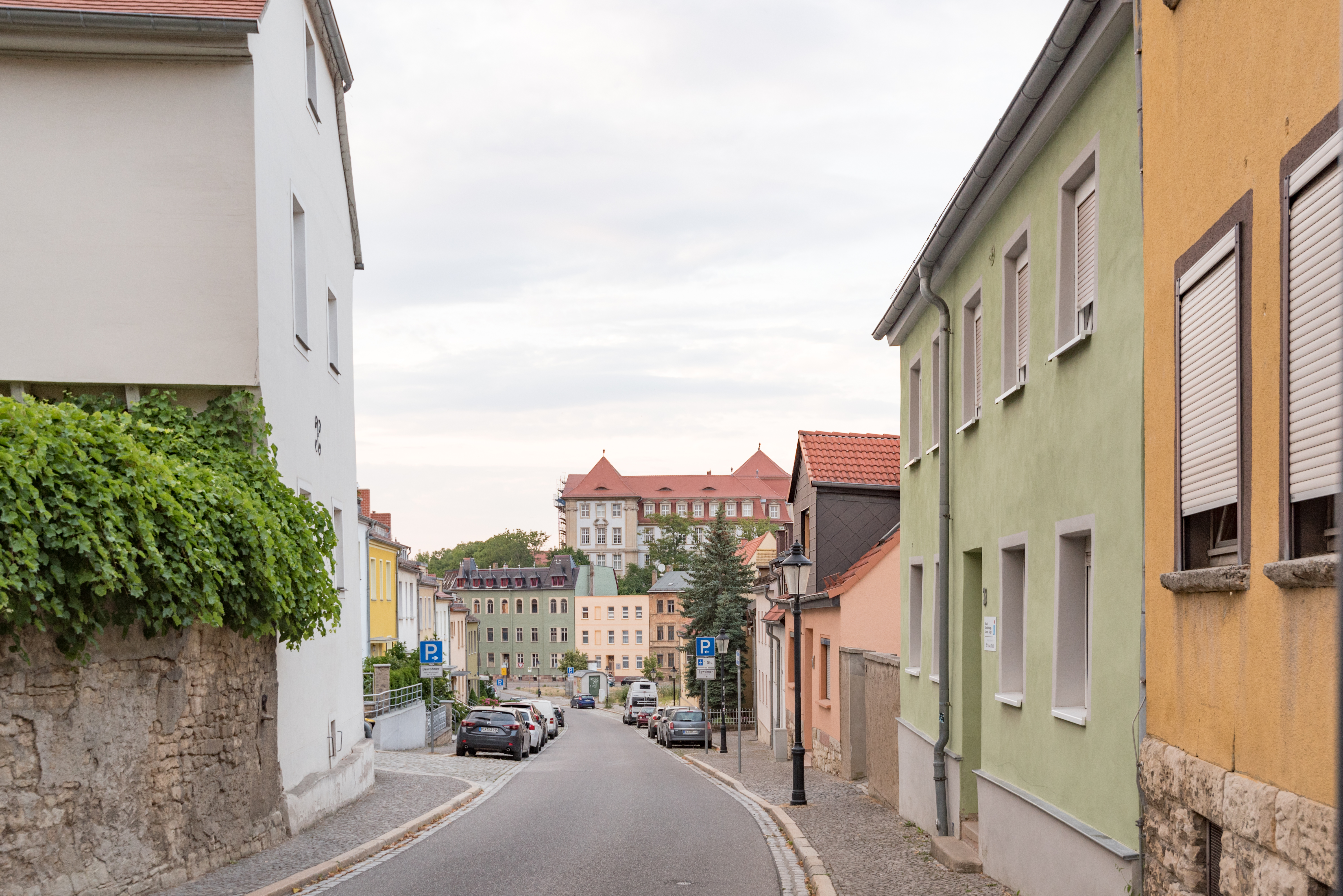 Naumburg (Saale), Moritzberg, Ansicht nach Norden